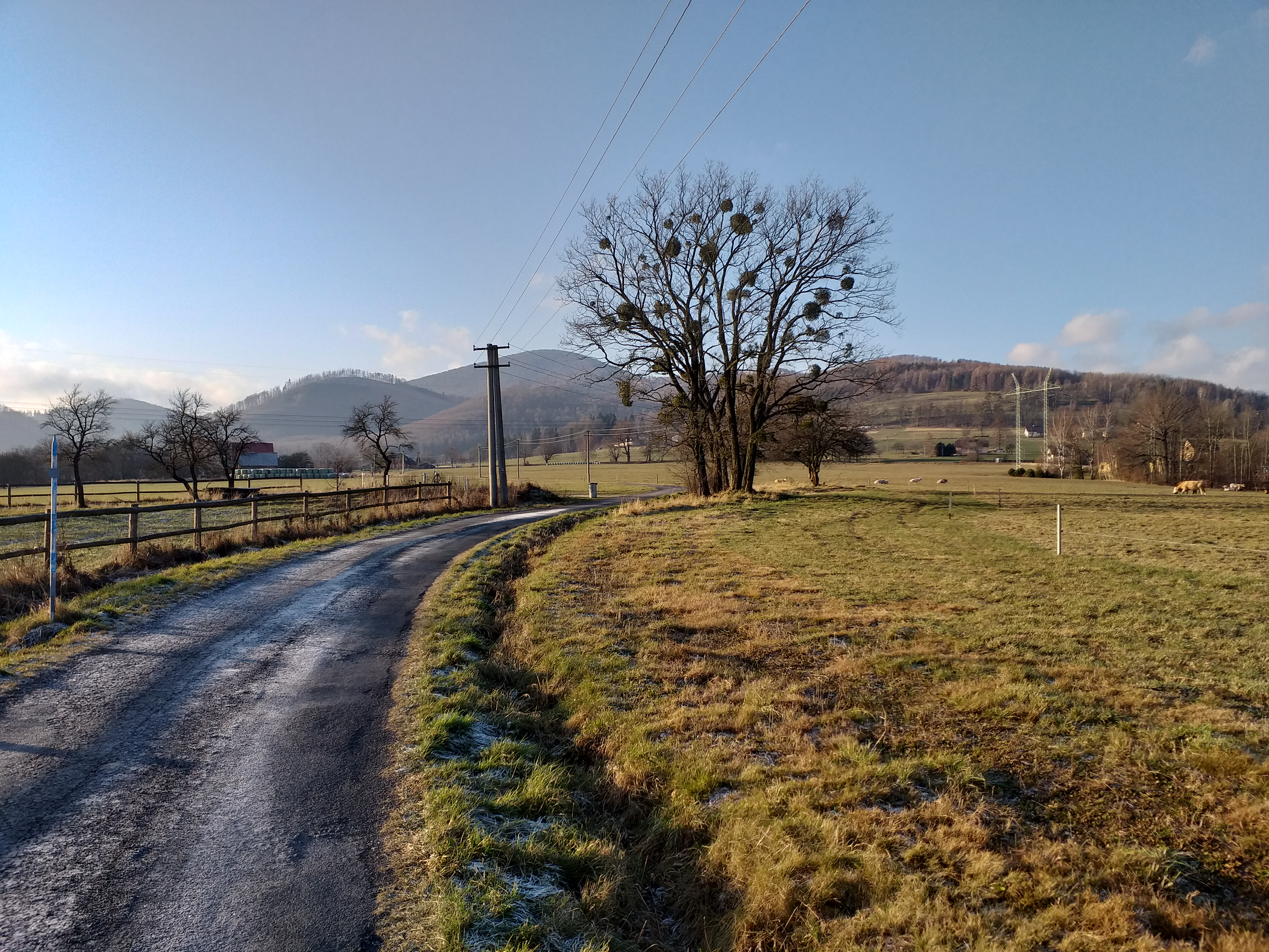 Karpentná